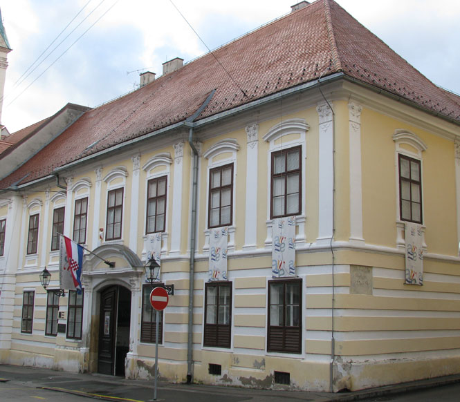 Hrvatski muzej naivne umjetnosti u Zagrebu